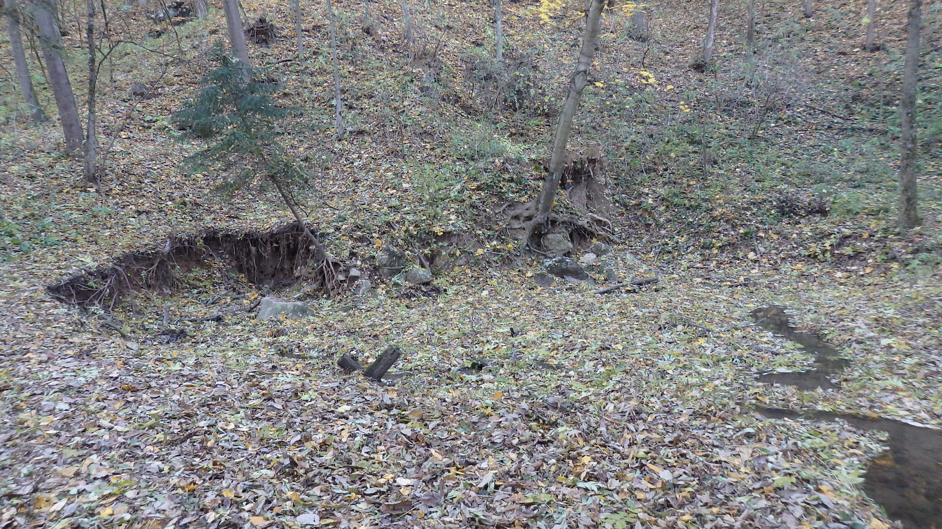 Kamenný žlíbek, údolí v CHKO Moravský kras, Hostěnické propadání ve východní části údolí